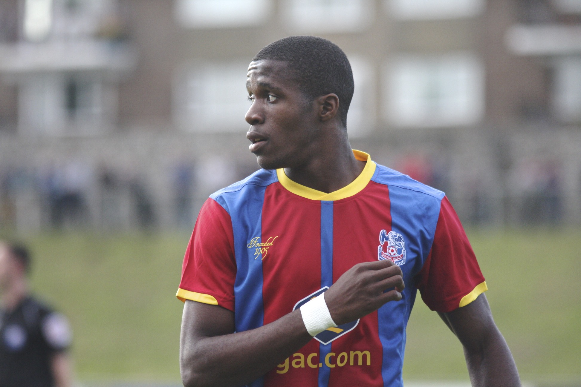 Wilfried Zaha